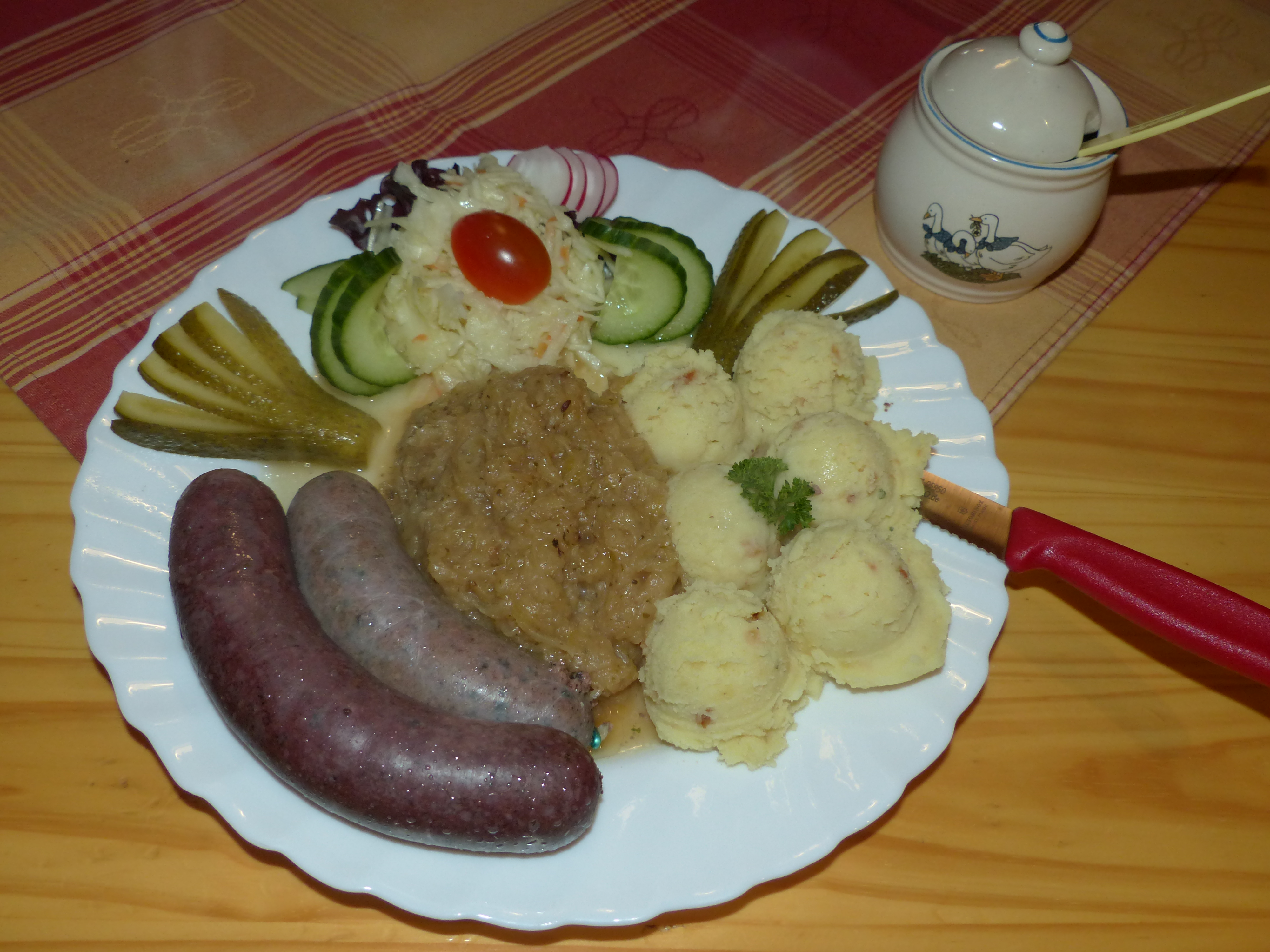 Schlachteplatte mit Blut- und Leberwurst, Restaurant Wanderstübel in Hinterhermsdorf